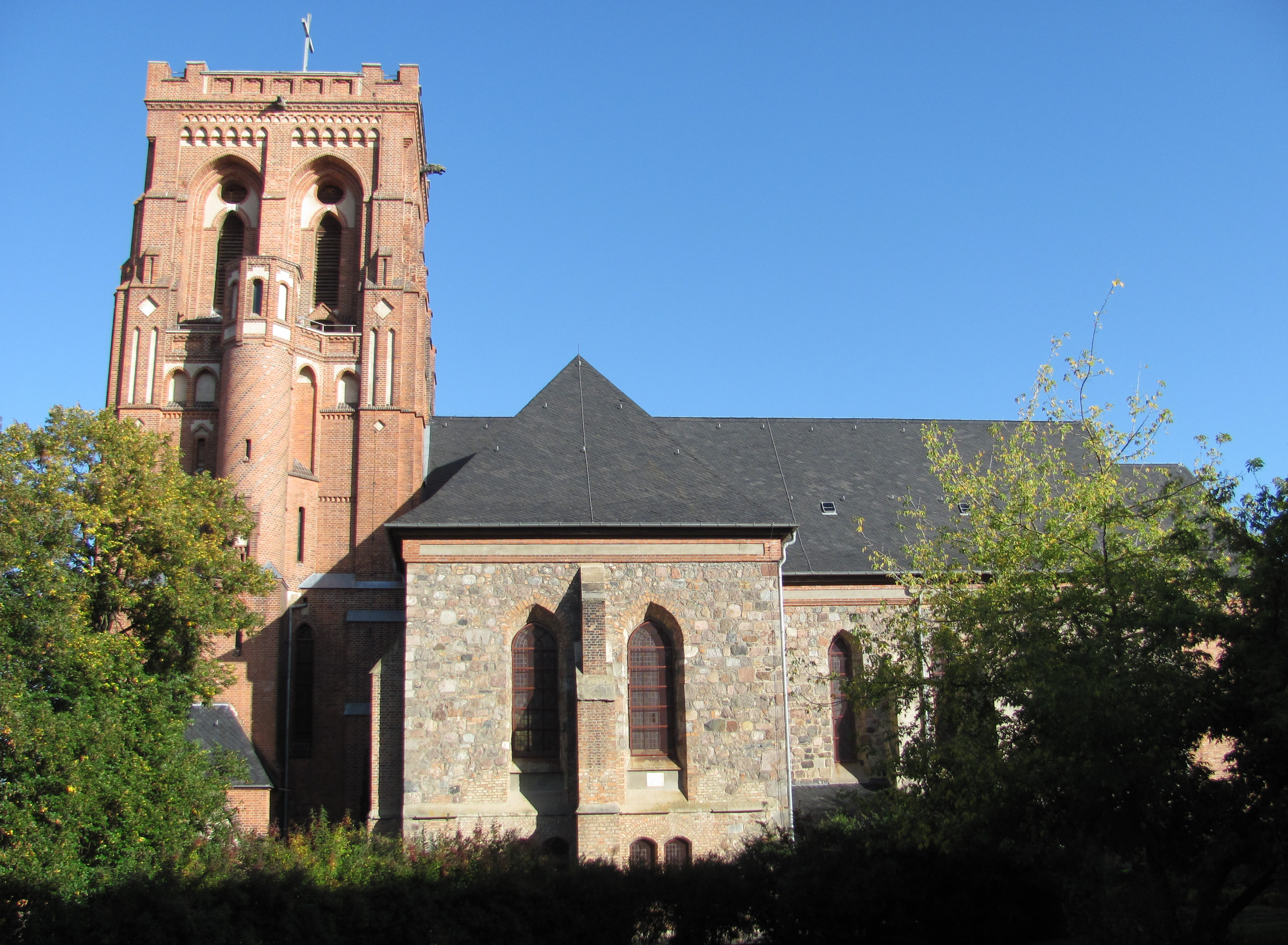 Schwedt, Denkmalliste Nr. 36